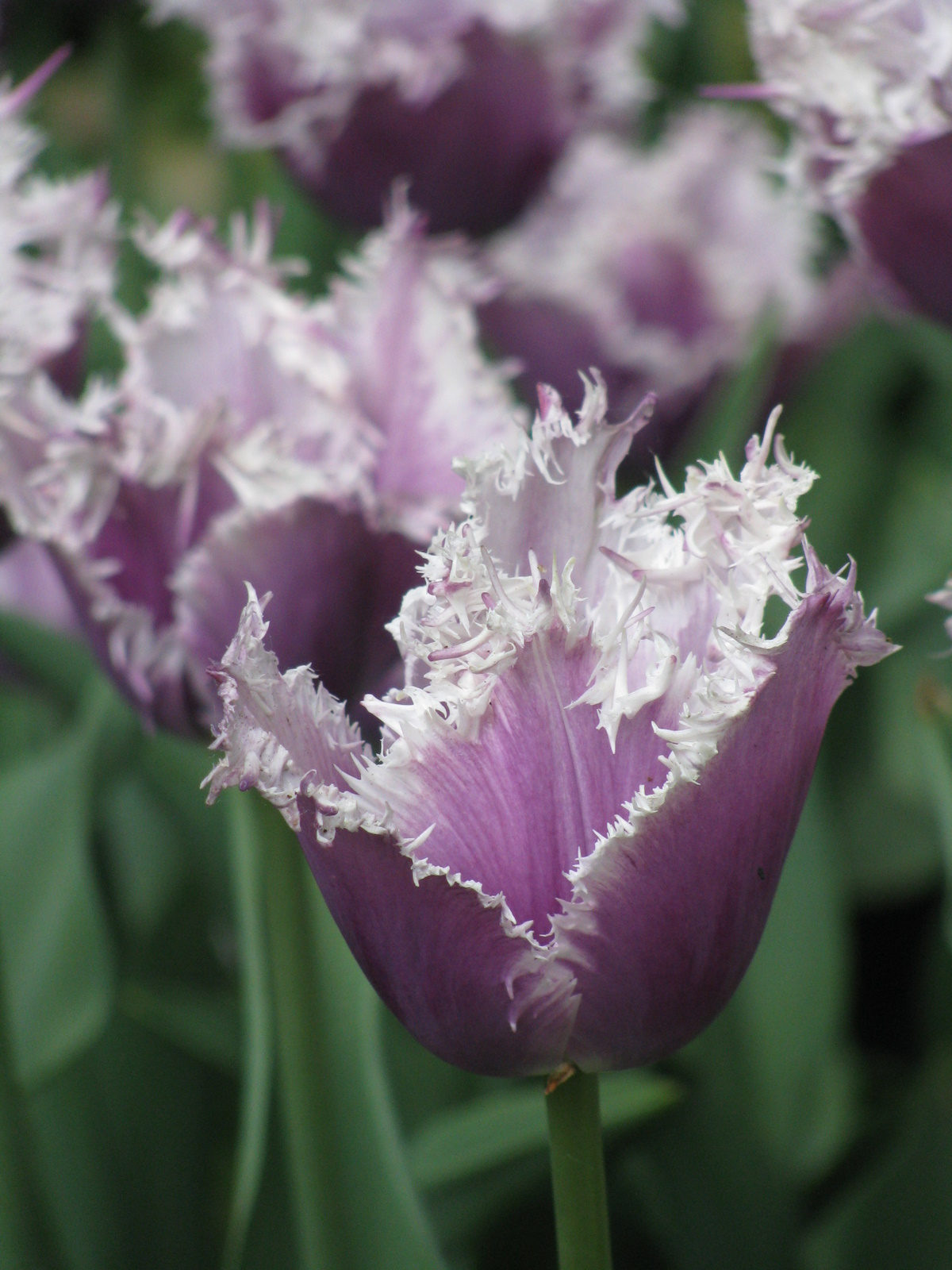 Keukenhof